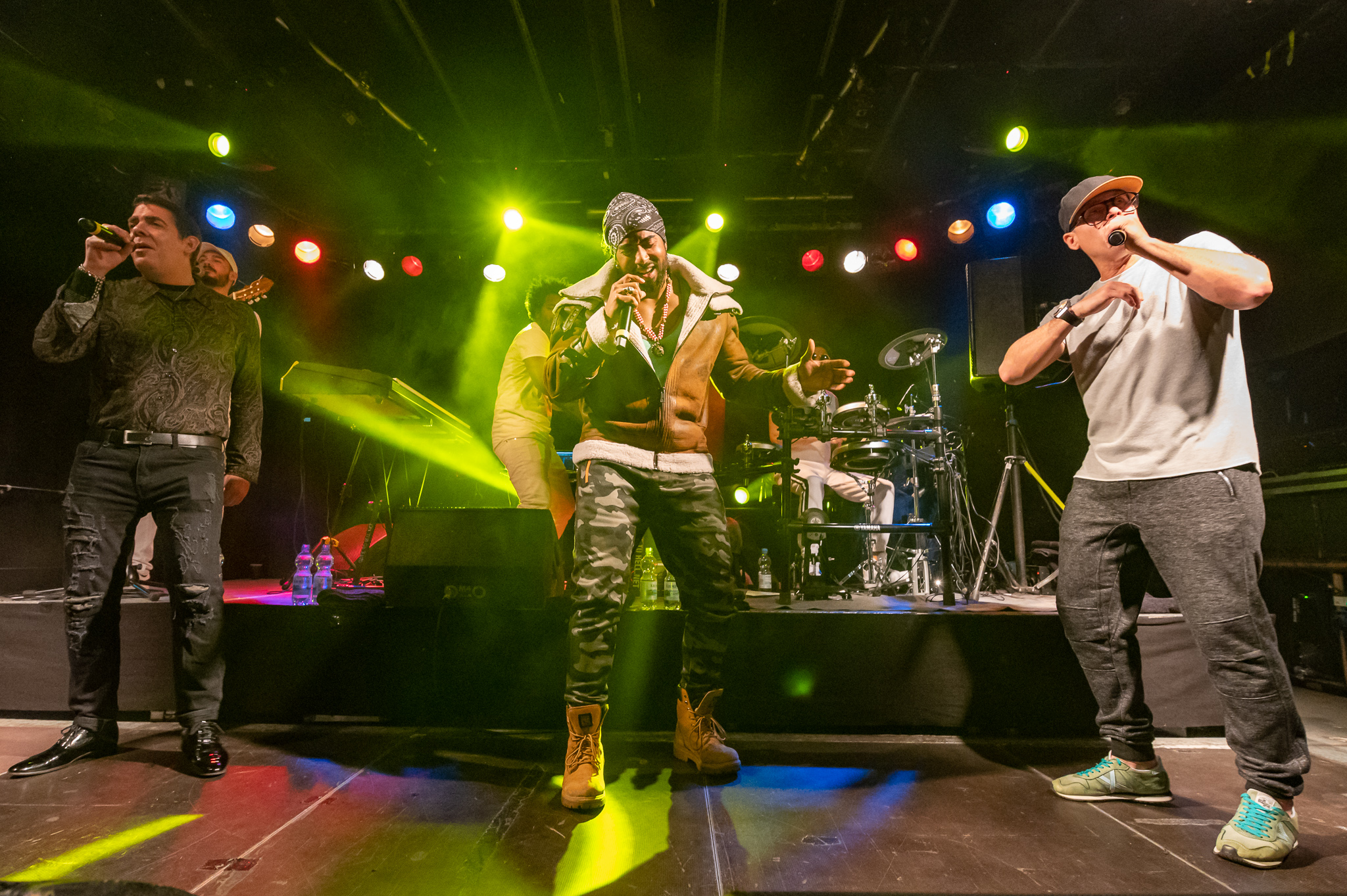 Concertbüro Franken,Der Hirsch,Hiram Riverí Medina,Konzert,Livekonzert,Livemusik,Origen Tour 2020,Orishas,Roldán González Rivero,Yotuel Omar Manzanarez Romero